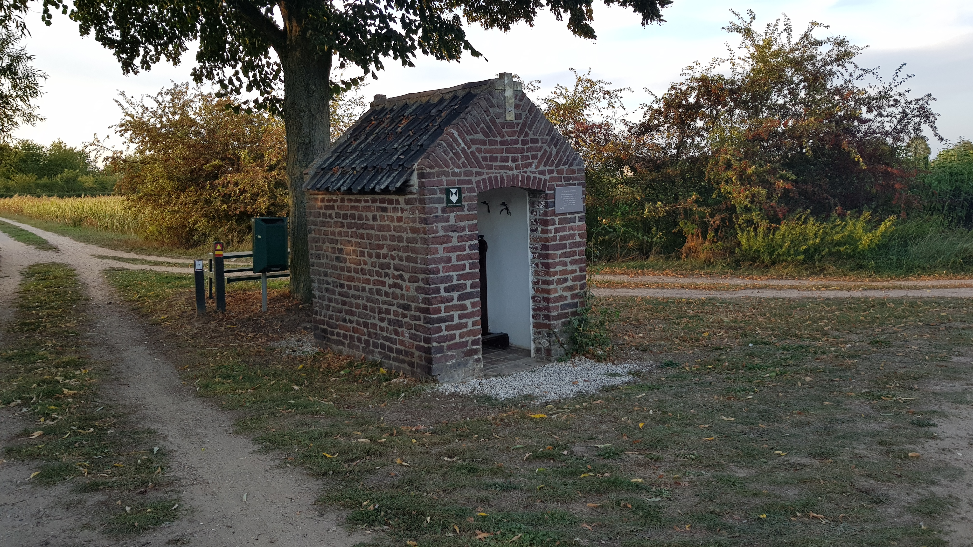 Onze-Lieve-Vrouw-van-Smartenkapel, Rijkel, Nederland